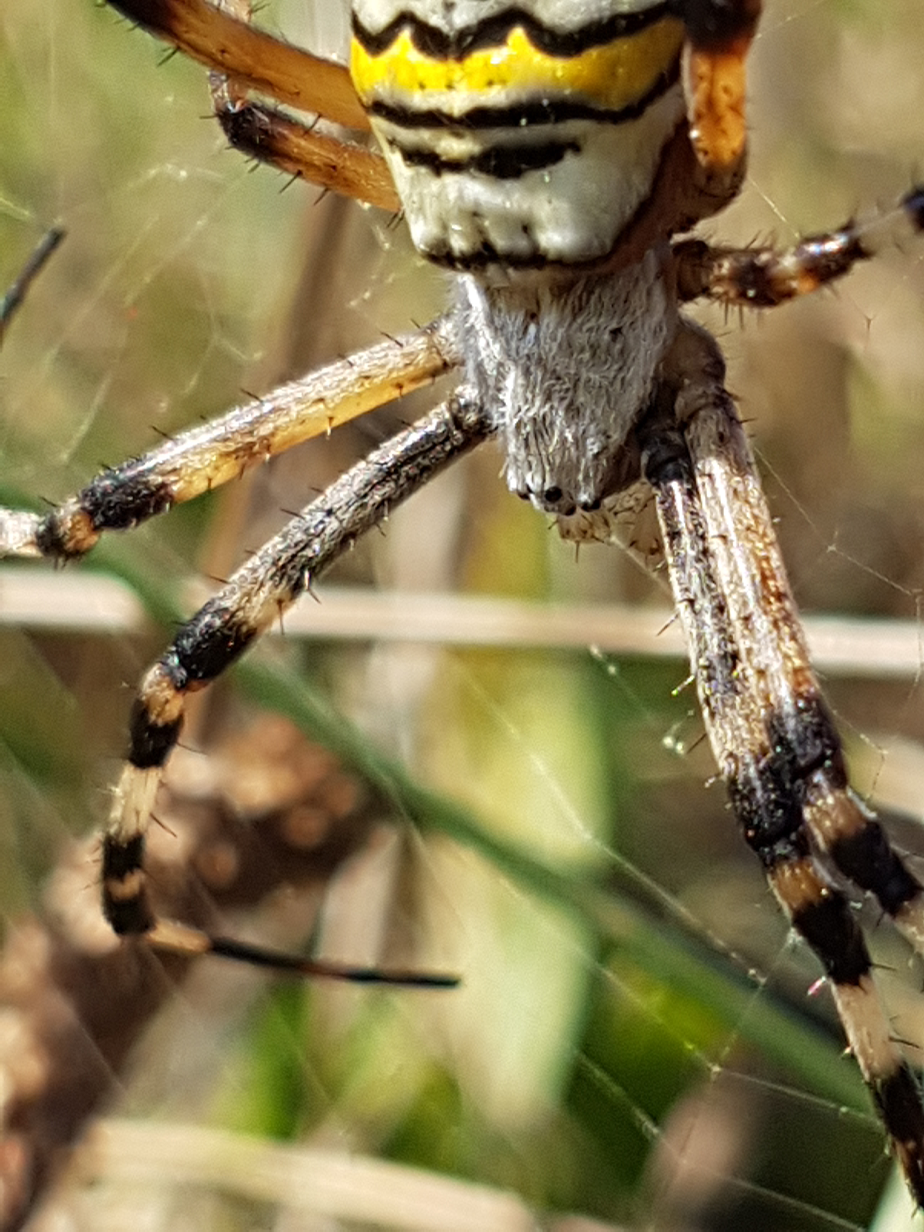 Nahaufnahme einer Wespenspinne (Argiope bruennichi)